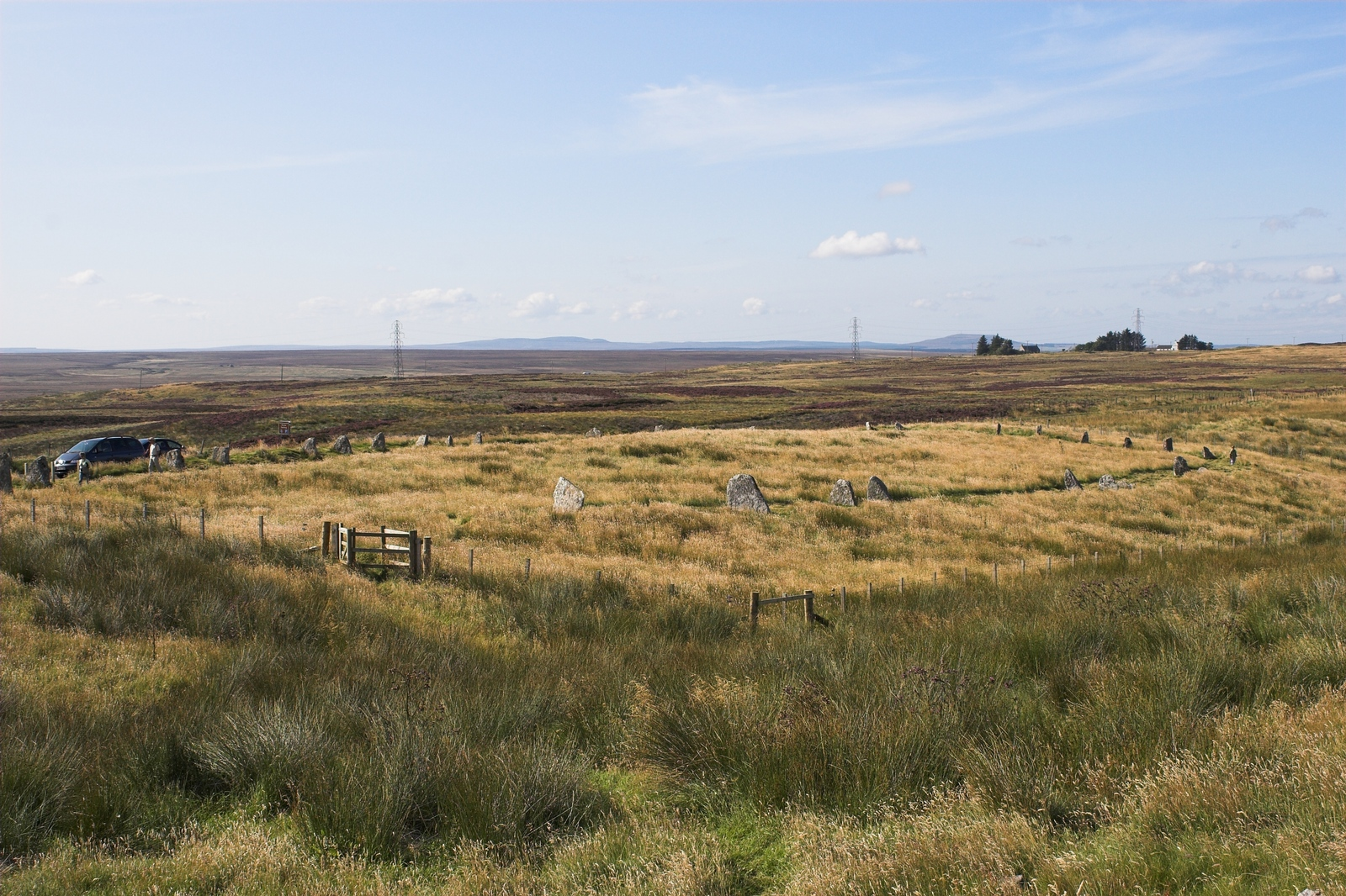 Achavanich Stone Setting, Scotland